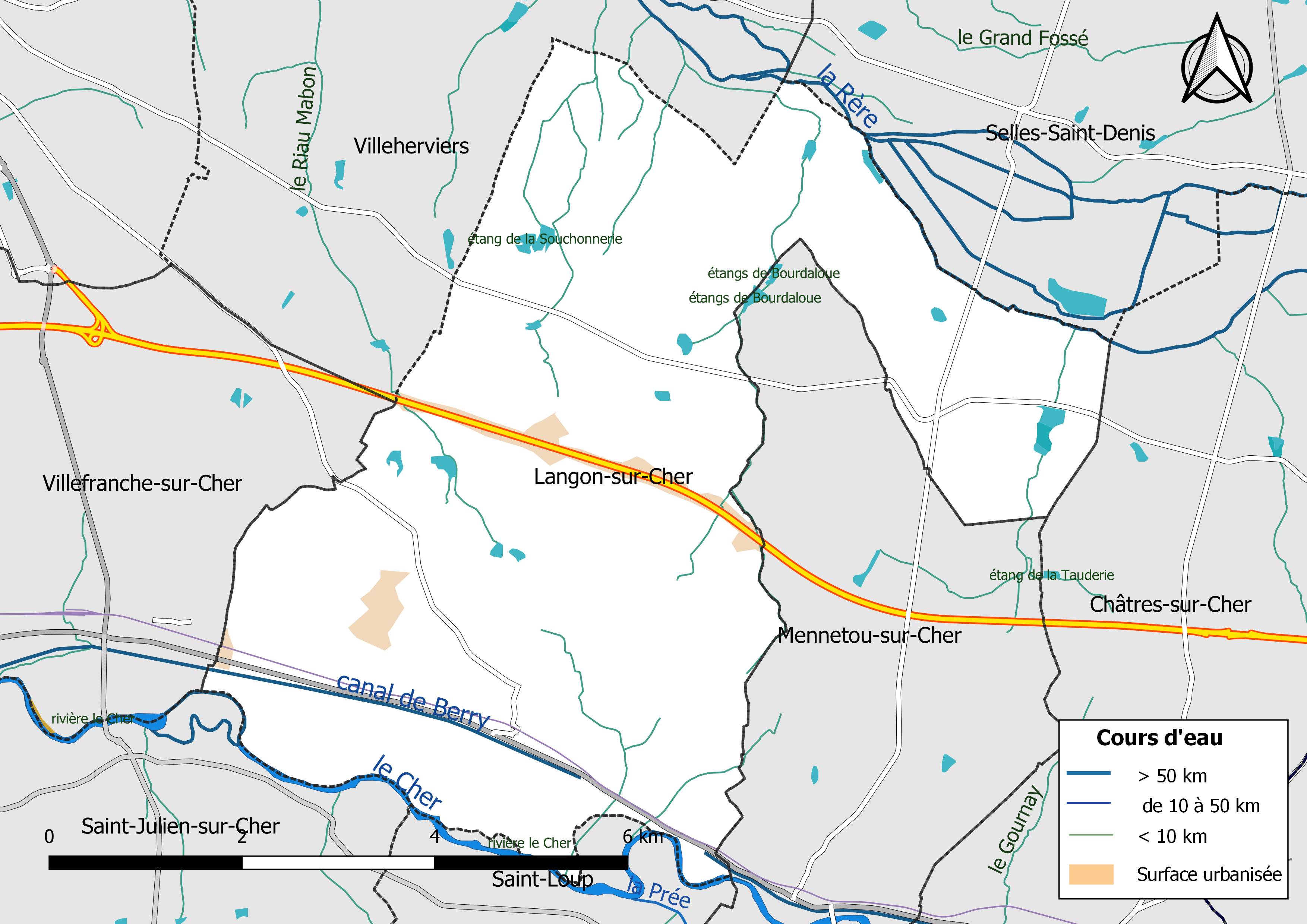 Carte du réseau hydrographique de la commune de Langon-sur-Cher (Loir-et-Cher, France).